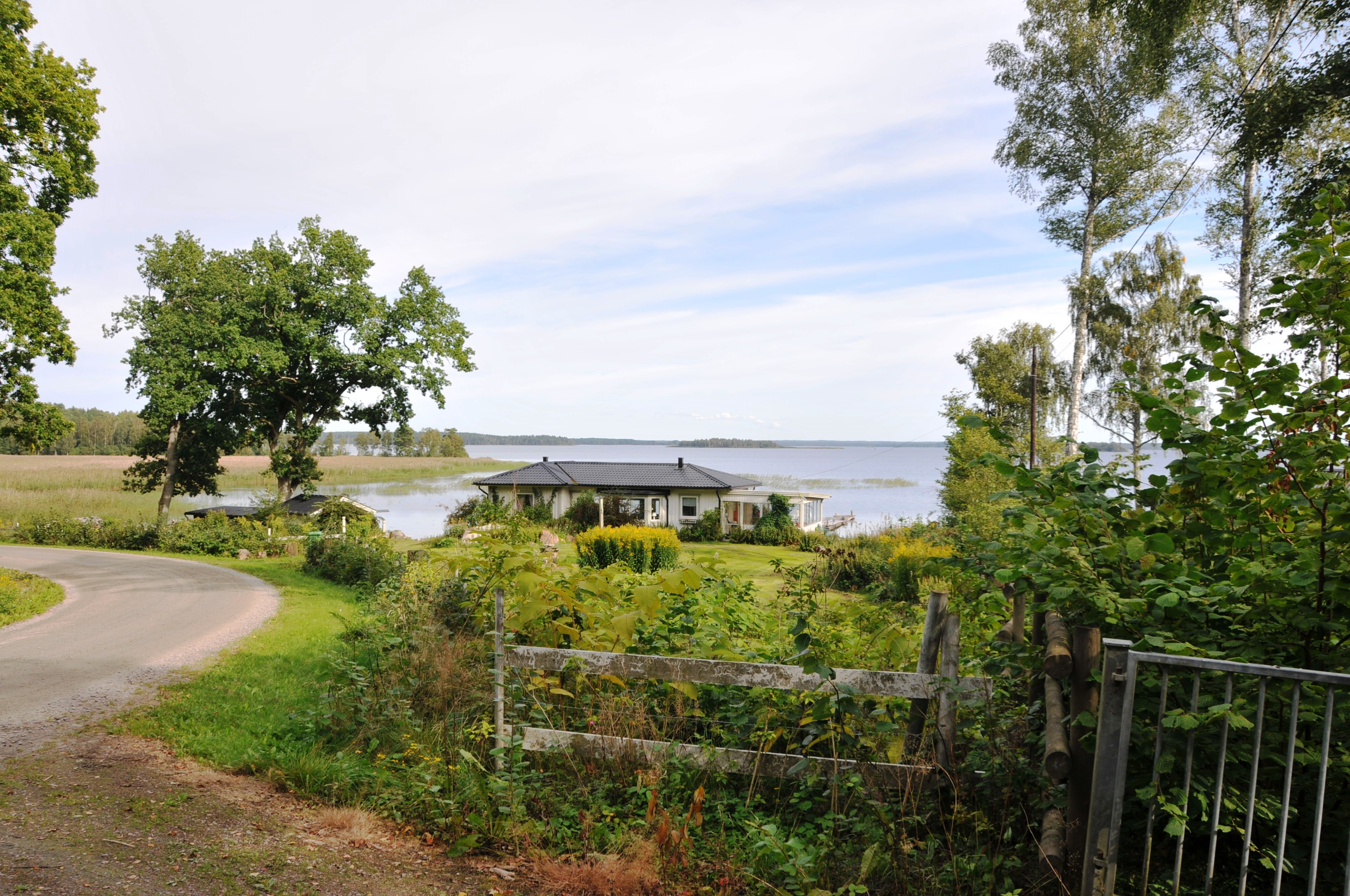 Schäreninsel Brommö